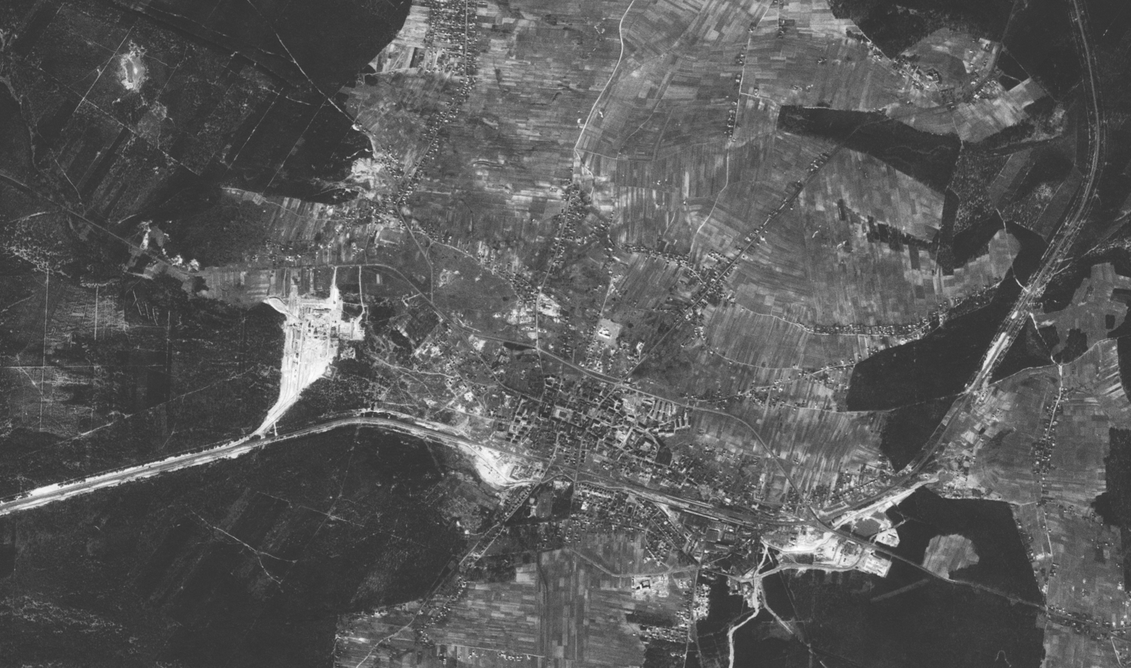 Olkusz sfotografowany 25 marca 1968 przez amerykańskiego satelitę wywiadowczego Corona 124 (KH-4A 1046-2). Zdjęcie stanowi fragment części b klatki nr 34. Zdjęcie odbite lustrzanie w obu kierunkach i obrócone tak, aby odzwierciedlało rzeczywiste położenie sfotografowanych obiektów. Zdjęcie w połowie oryginalnej rozdzielczości.